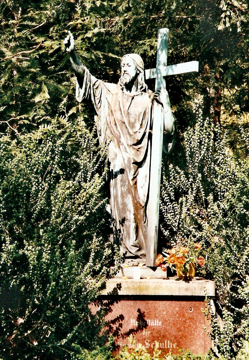 Lübecker Burgtorfriedhof; Erbbegräbnis der Familie Schultze